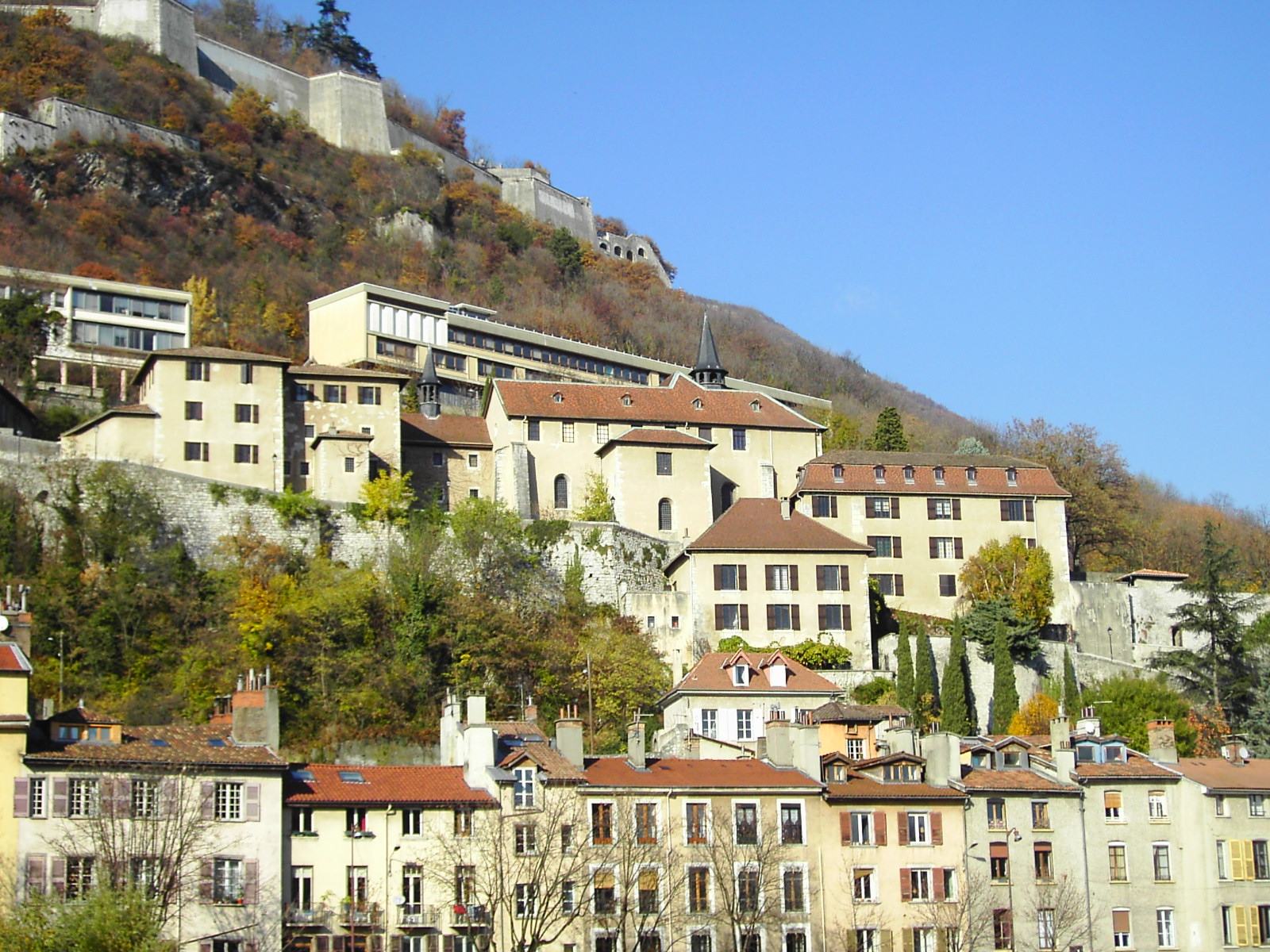 Musée Dauphinois à Grenoble (ancien couvent dont la construction débuta le 21 octobre 1619)